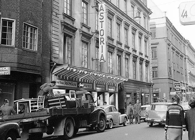 Nybrogatan norrut med biografen Astoria